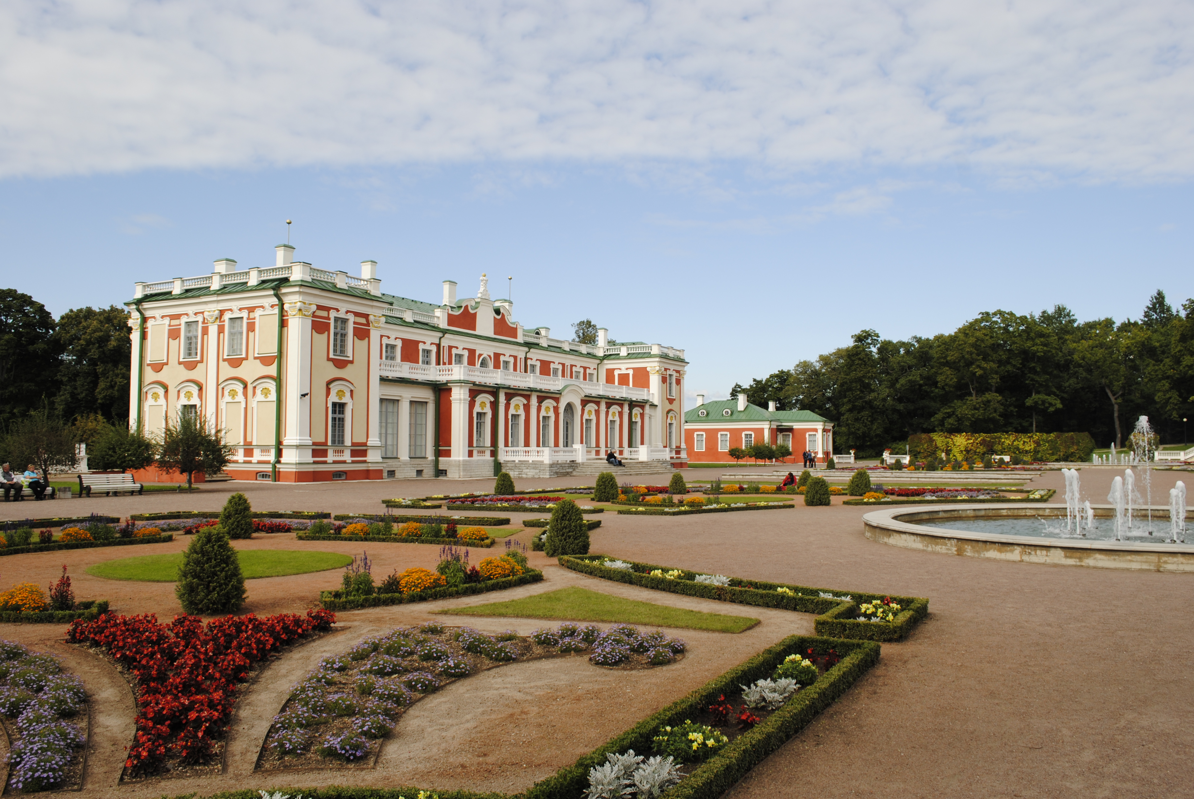 Das Schloss Kadriorg in Tallinn